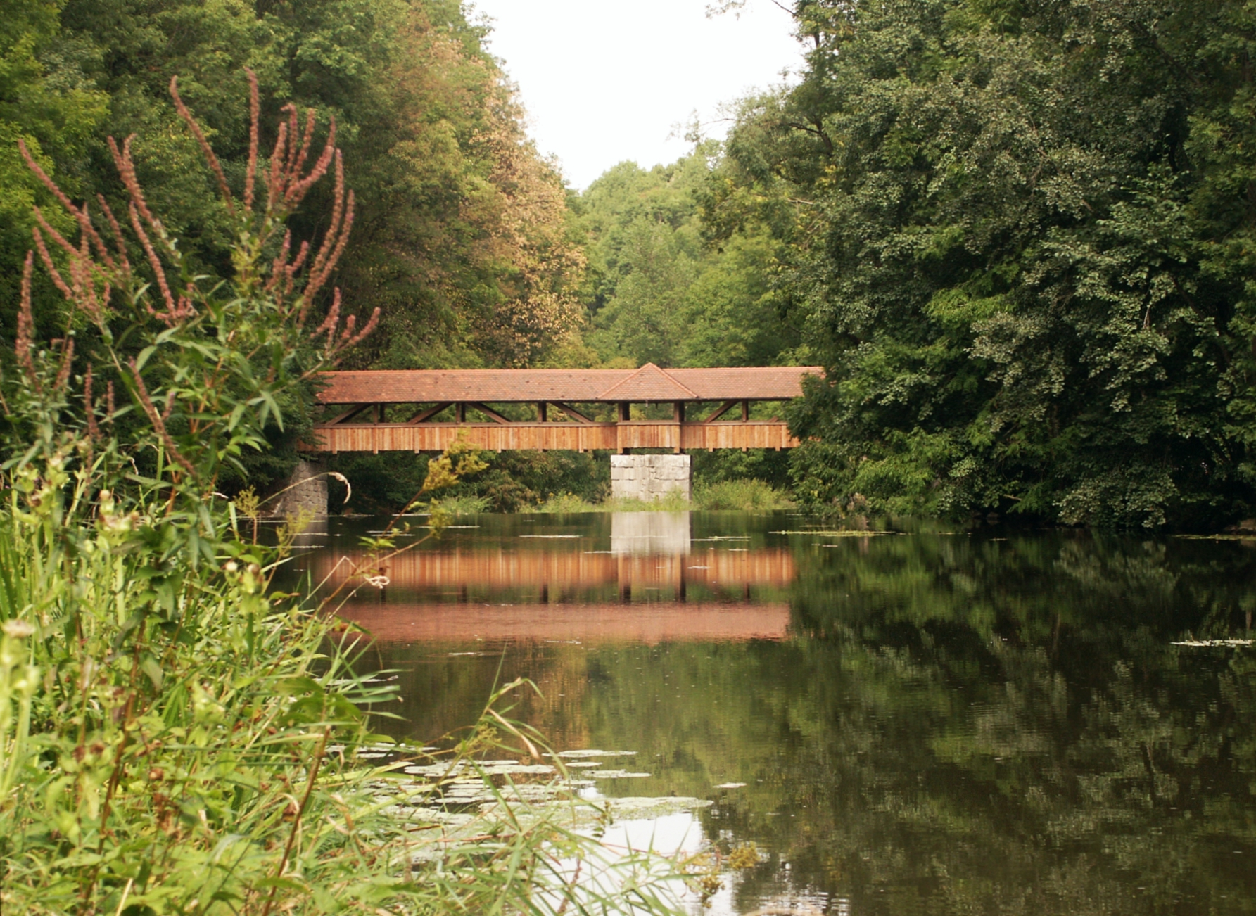 Die Jagst bei der Holzbrücke an der ehemaligen Heinzenmühle im Jagsttal zwischen Crailsheim und Kirchberg